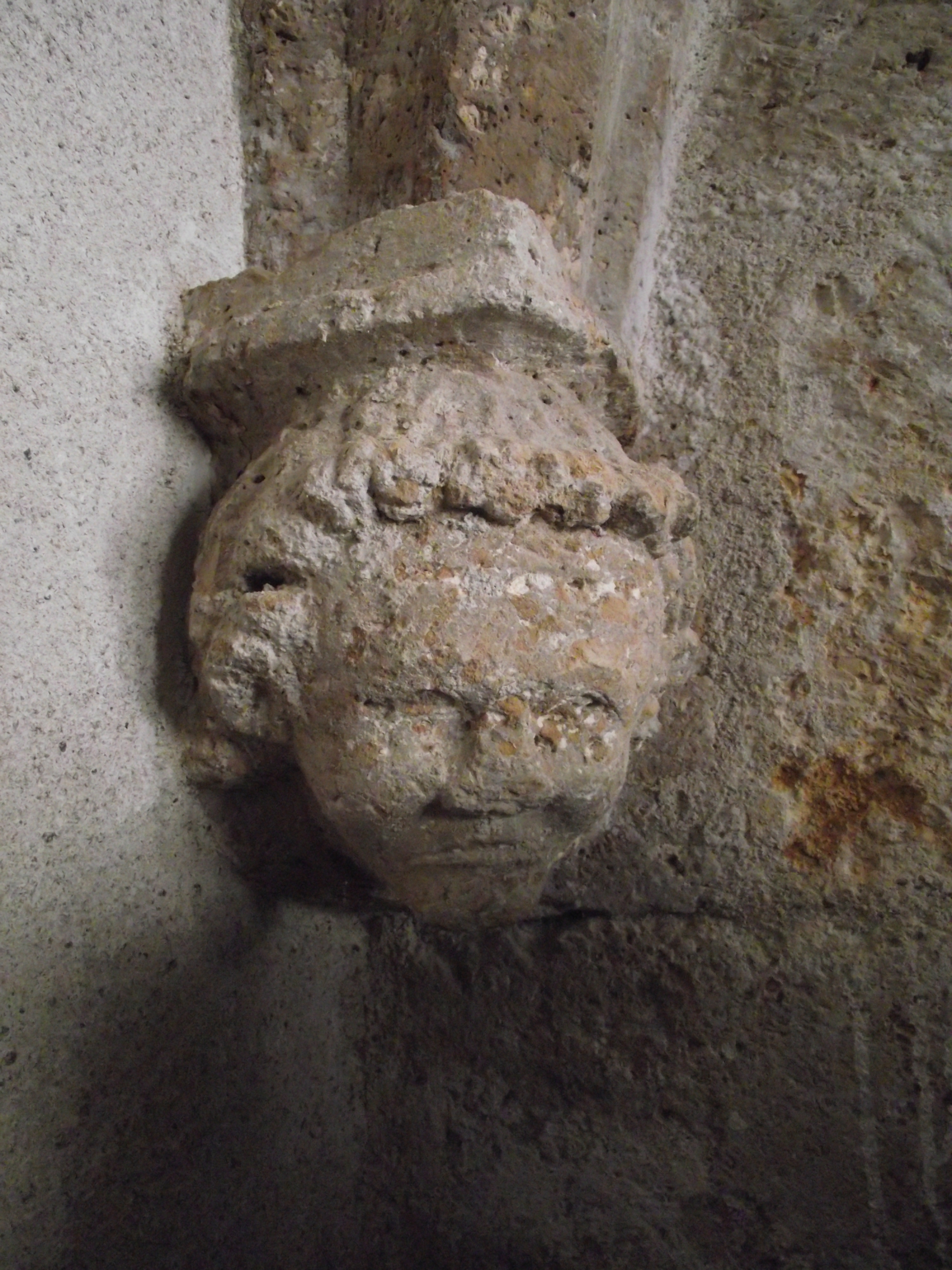 Visage sur cul-de-lampe. Salle capitulaire du bâtiment Hugo. Lycée Augustin-Thierry de Blois.